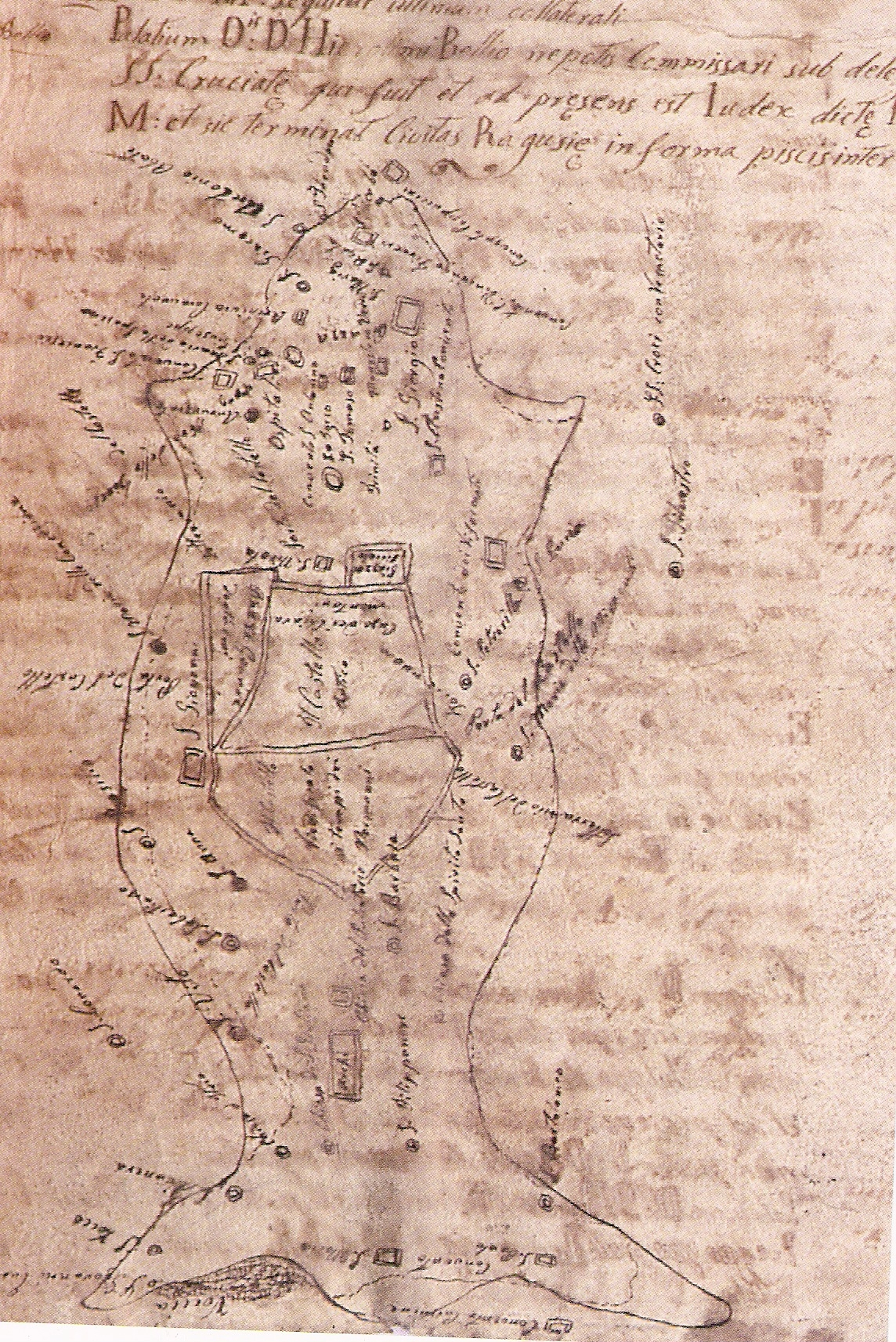 Mappa di Ragusa con la descrizione della Forma Piscis